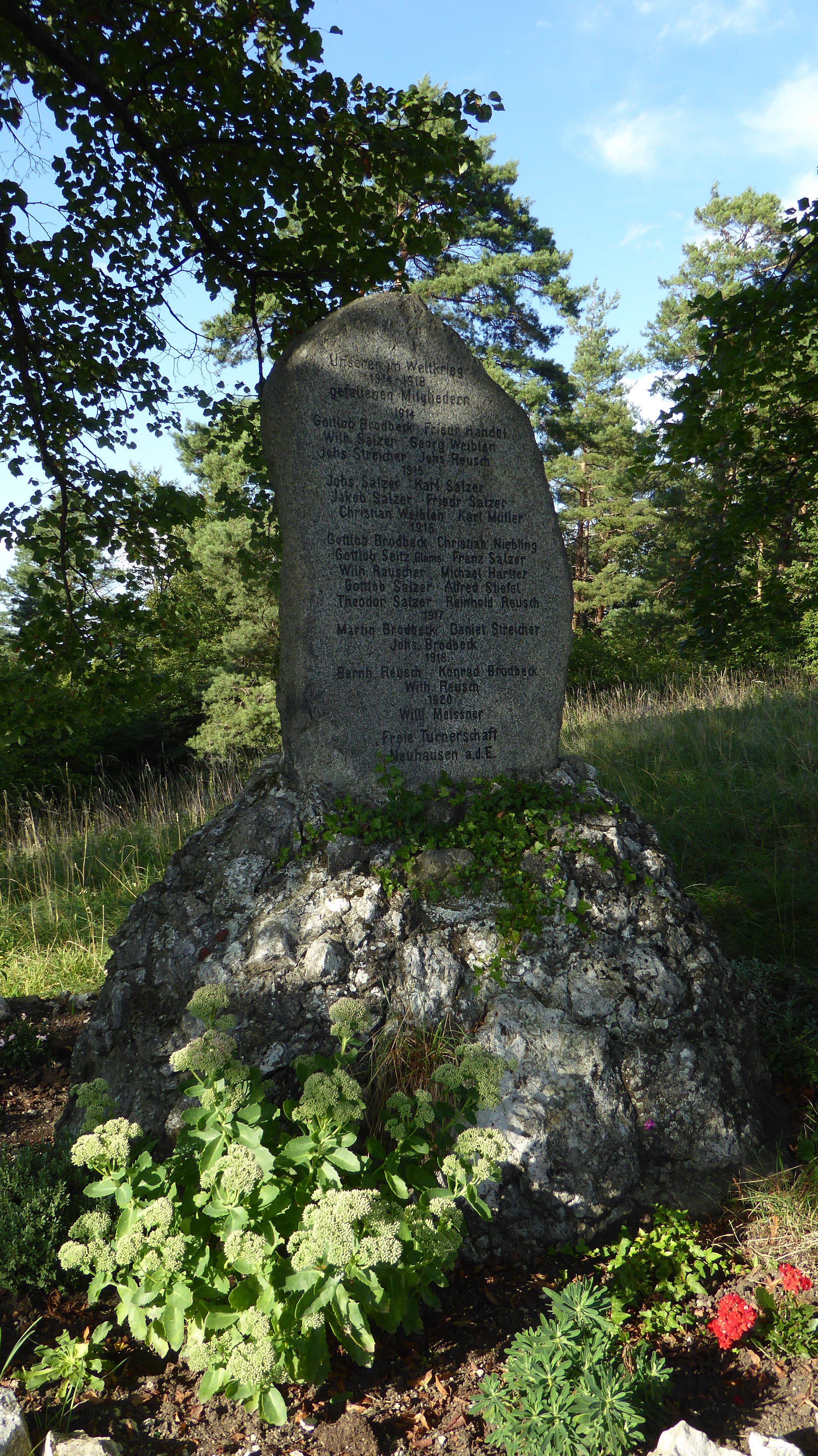 Denkmal für die im 1. Weltkrieg gefallenen Mitglieder der Freien Turnerschaft Neuhausen. Zwei Granittafeln mit Gedenk- und Namensinschriften auf halbrundem Mauersockel, nach 1918. Hofbühl (Gewann), Neuhausen an der Erms